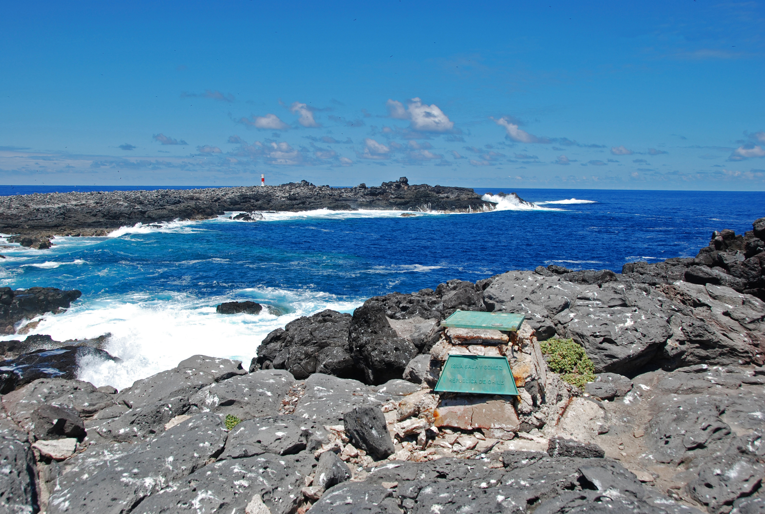 Fotos obtenidas durante la expedición que Oceana, National Geographic y la Armada de Chile realizaron en febrero al Parque Marino Motu Motiro Hiva.